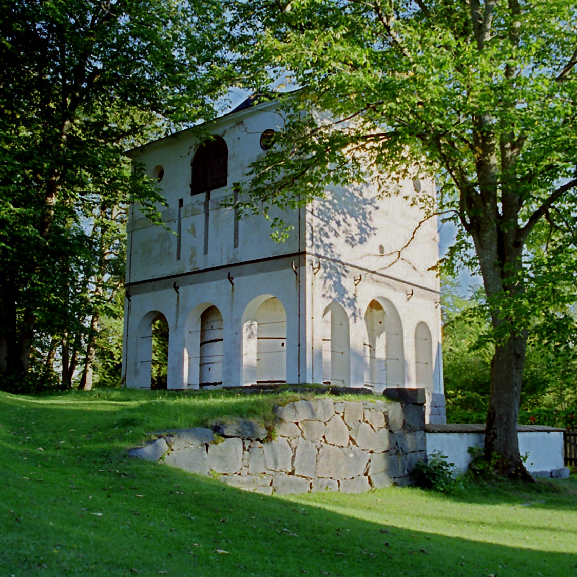 Masugnen vid Vällnora bruk